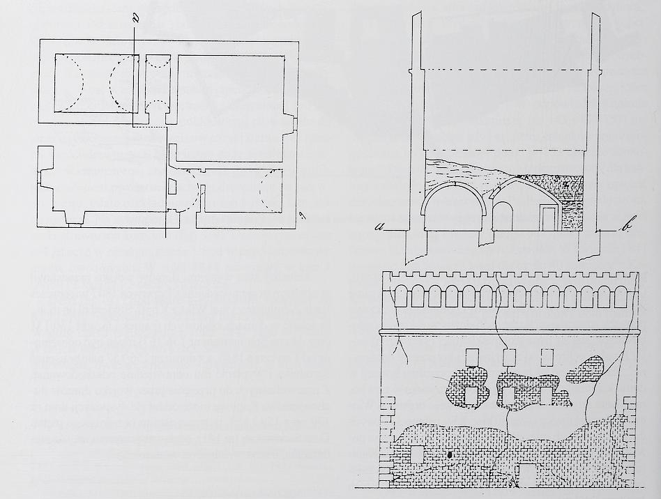 Sporządzony w 1848 roku rysunek elewacji, przekroju i planu Domu Borka stojącego do połowy XIX wieku na dziedzińcu zewnętrznym zamku na Wawelu.